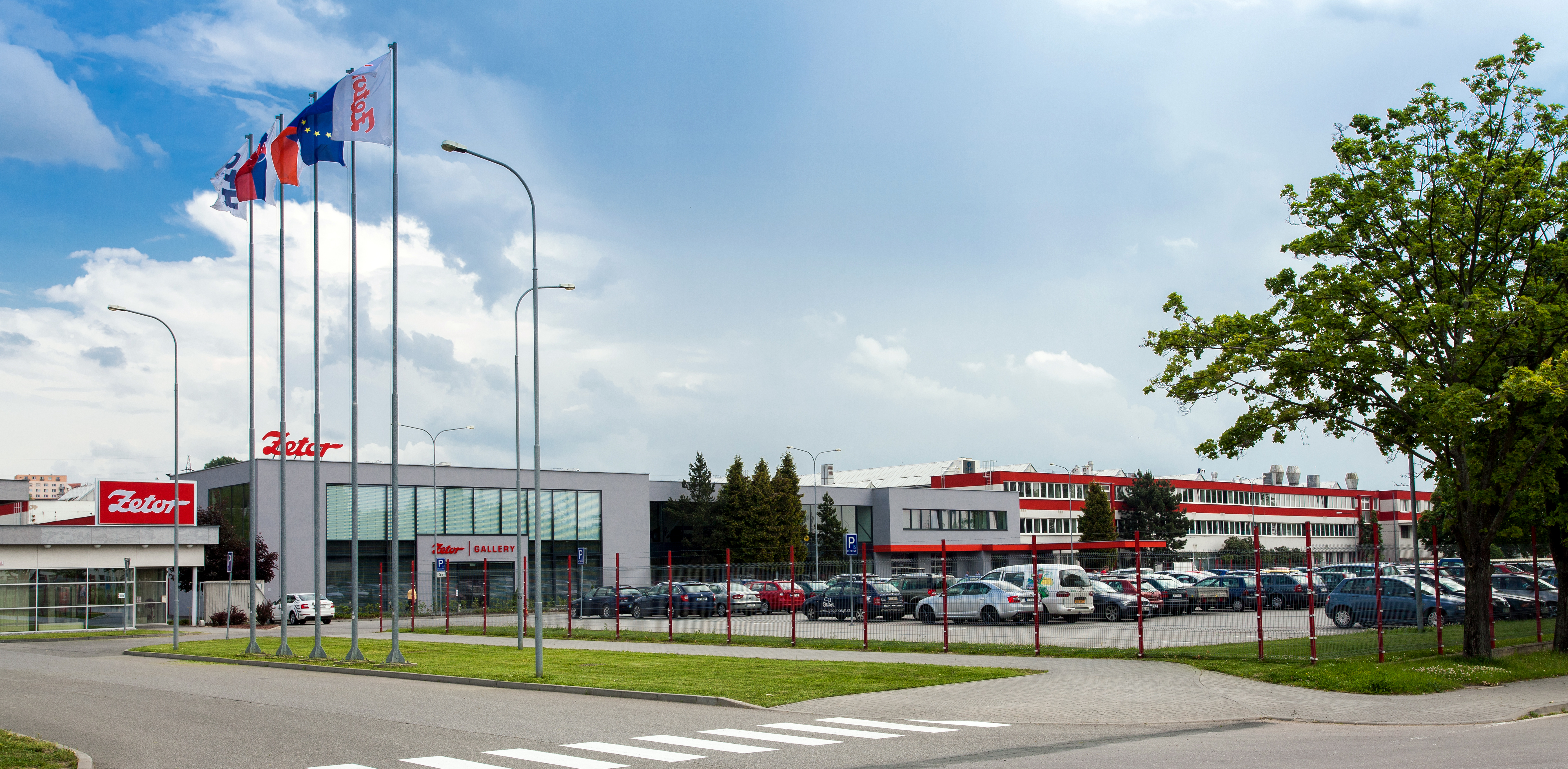 Zetor Headquarter, Trnkova 111, Brno, Czech Republic